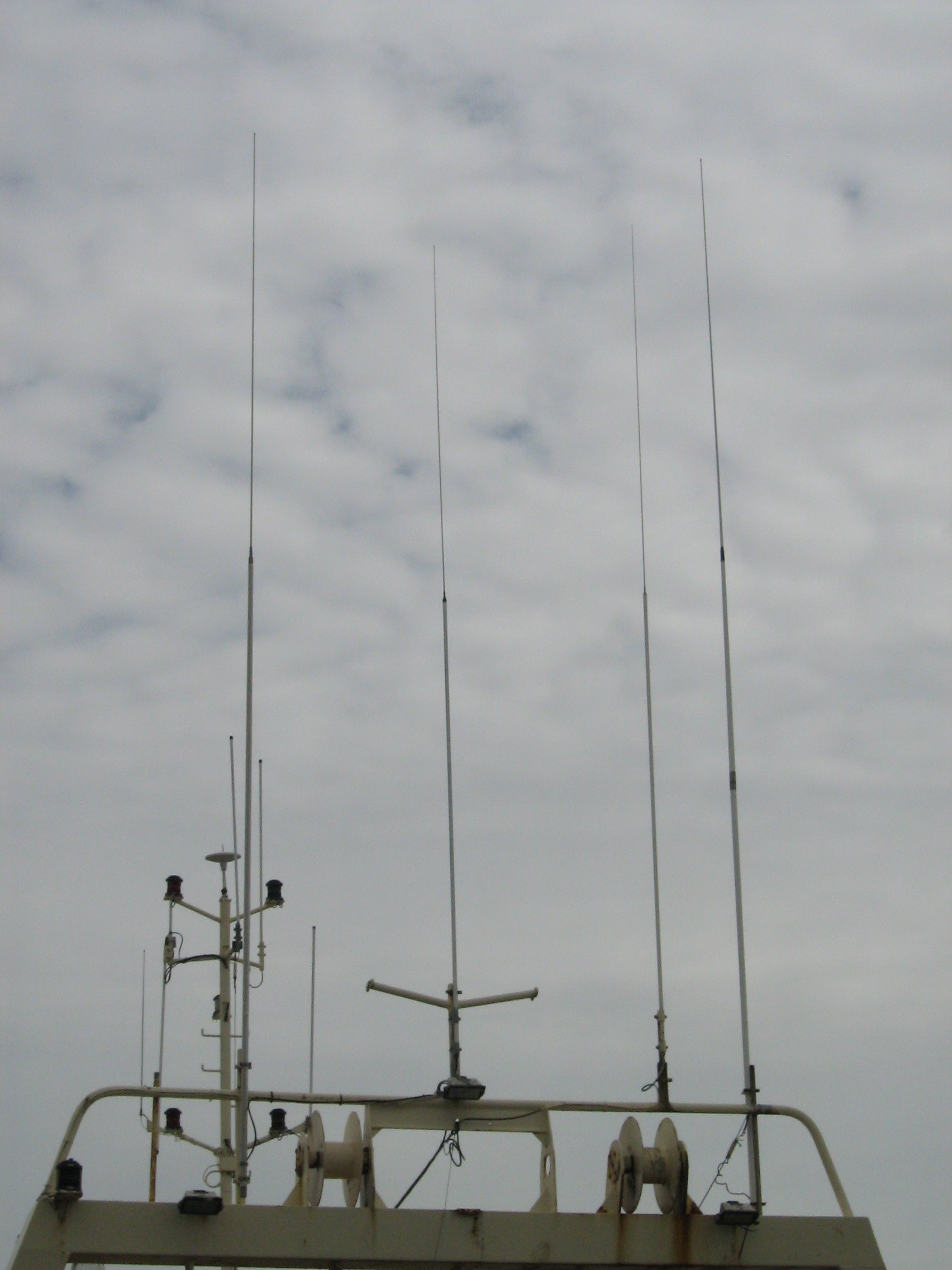 antennes verticales de navire de pêche pour la Zone A1 et A2 SMDSM.